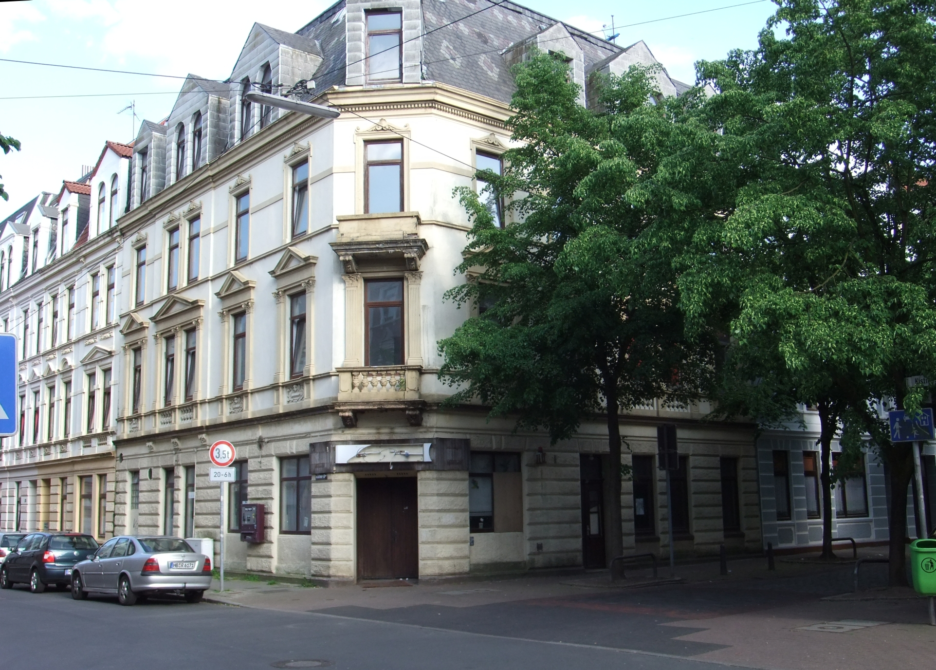 Mietshaus in Bremerhaven, Goethestraße 30. Das abgebildete Objekt ist ein geschütztes Kulturdenkmal in der Freien Hansestadt Bremen, mit der Nr. 1605 beim Landesamt für Denkmalpflege registriert.